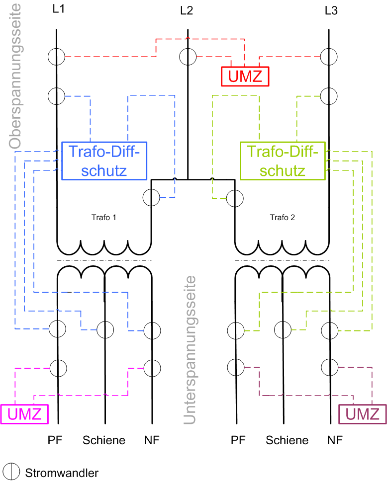 Prinzip eines Schutzkonzeptes für UW-Trafo beim AT-System